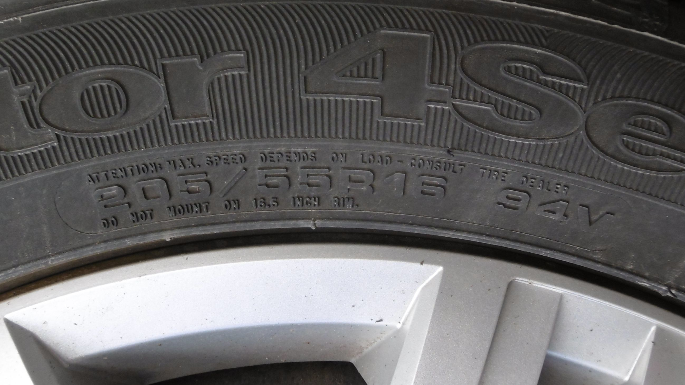 Angabe auf einem Autoreifen